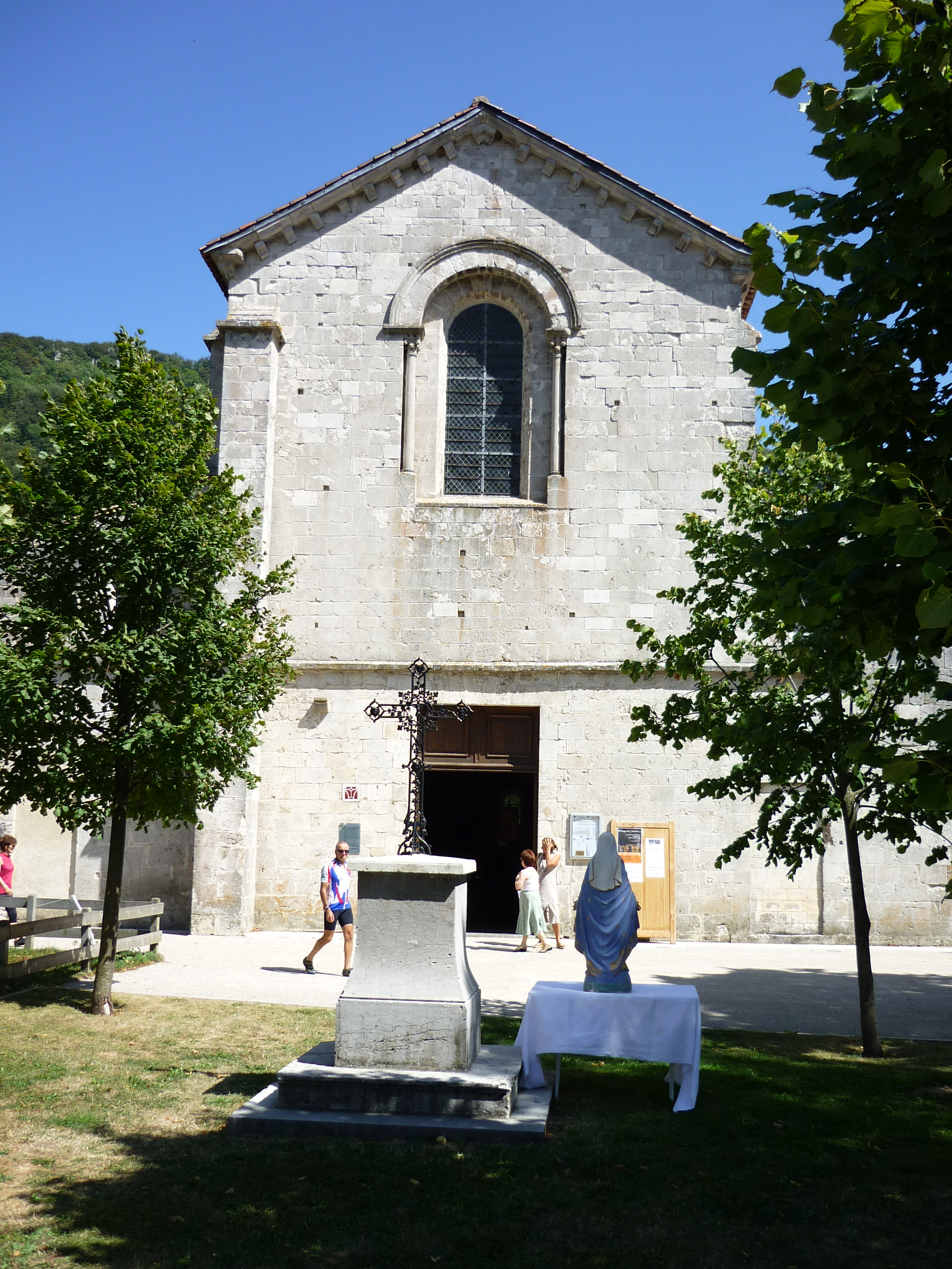 Klosterkirche, Westfassade